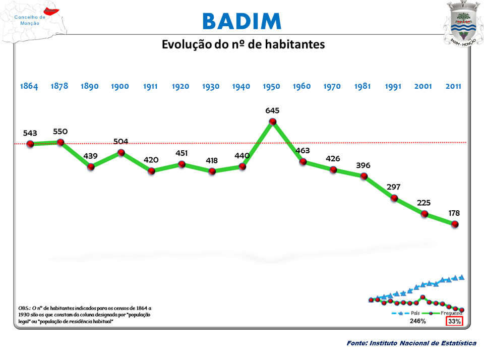 Censos 1864/2011